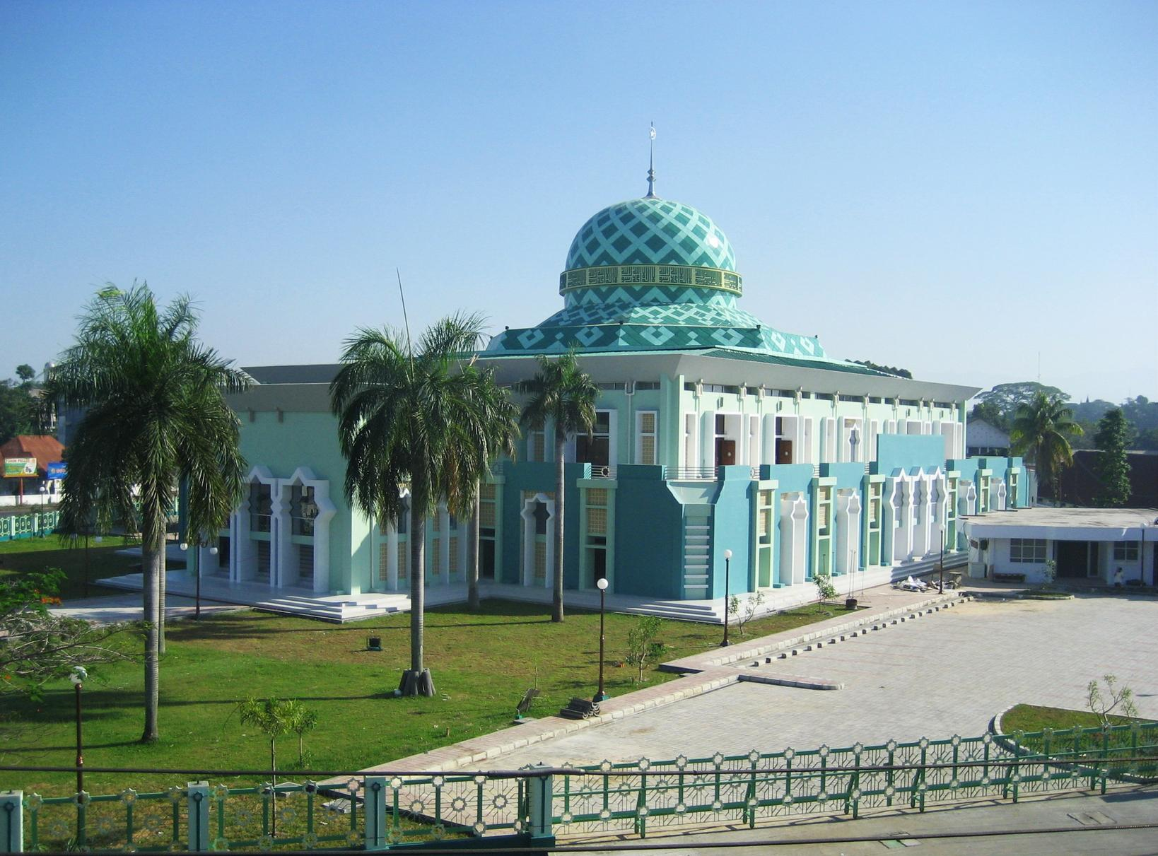 Masjid Nurul Iman Padang